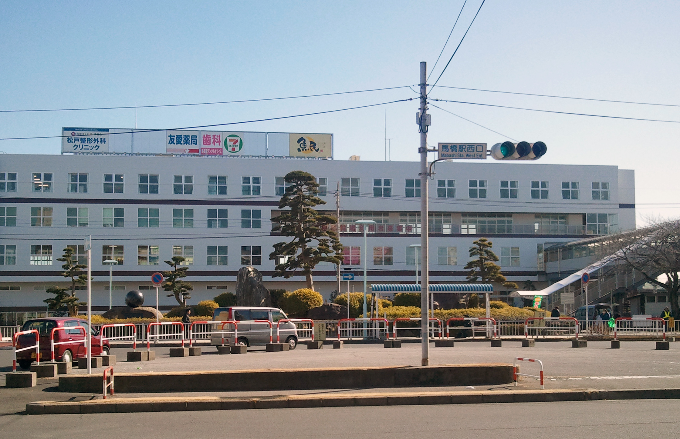 馬橋駅西口駅ビル全景